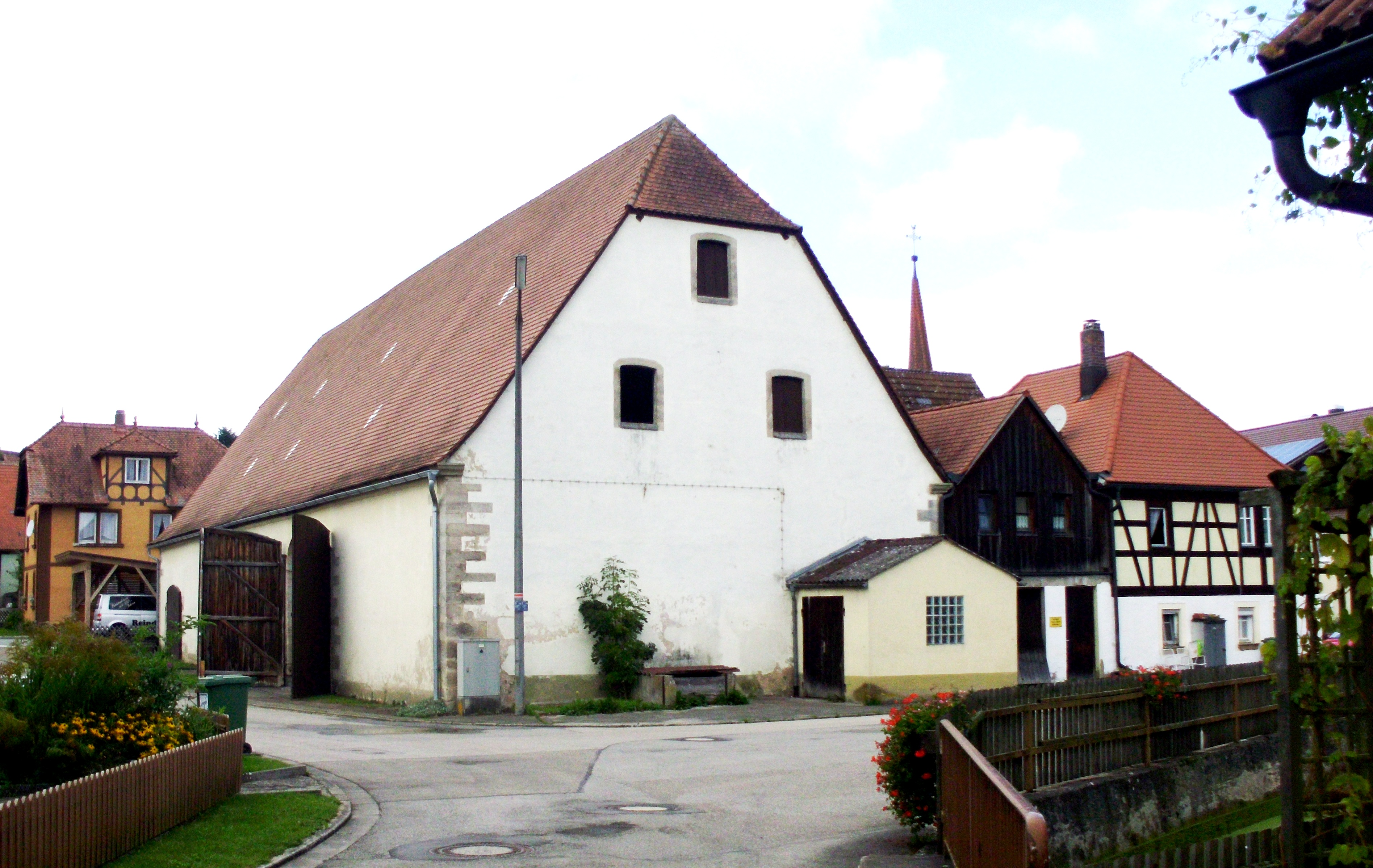 Jochsberg, Ortsteil von Leutershausen im Landkreis Ansbach, Brauereischeune von 1508